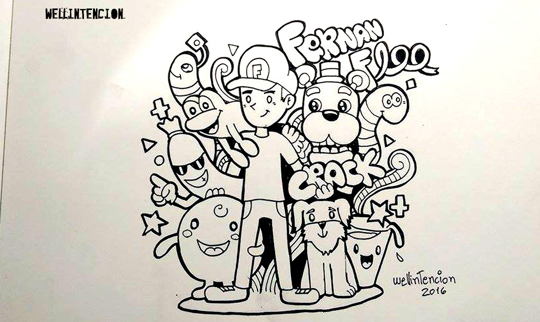 Fan art del youtuber salvadoreño Fernanfloo hecho por : [ Aaron Arana (Wellintecion) Sitio oficial de youtube,(primer canal): Segundo sitio oficial,(segundo canal o canal secundario)